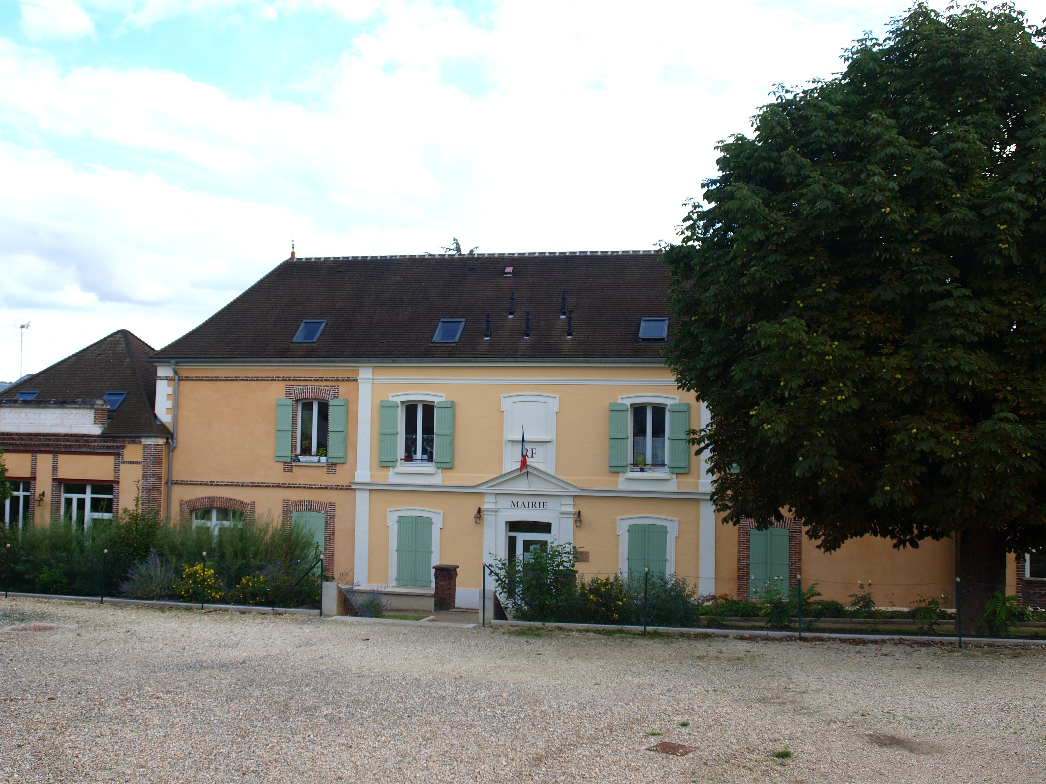 Thorigny-sur-Oreuse (Yonne, France) ; commune associée de Saint-Martin-sur-Oreuse : mairie école